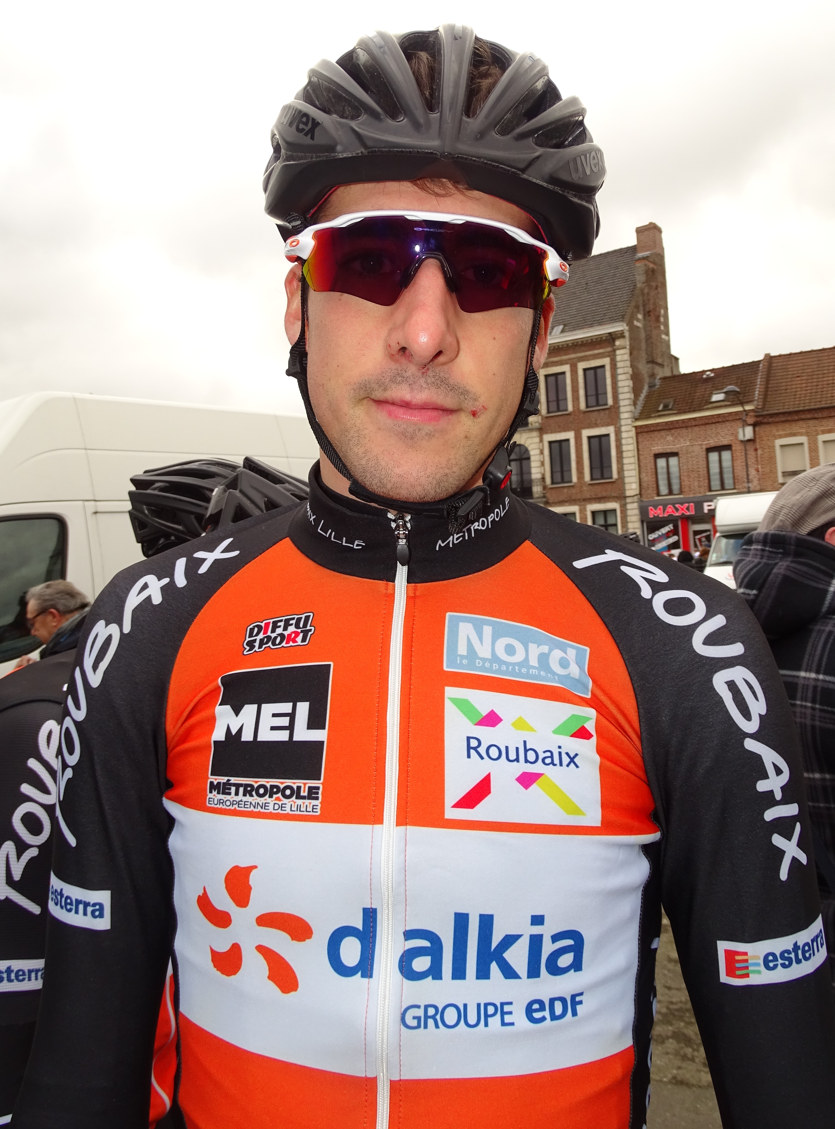 Reportage réalisé le dimanche 6 mars à l'occasion du départ et de l'arrivée du Grand Prix de Lillers-Souvenir Bruno Comini 2016 à Lillers, Pas-de-Calais, Nord-Pas-de-Calais, France.